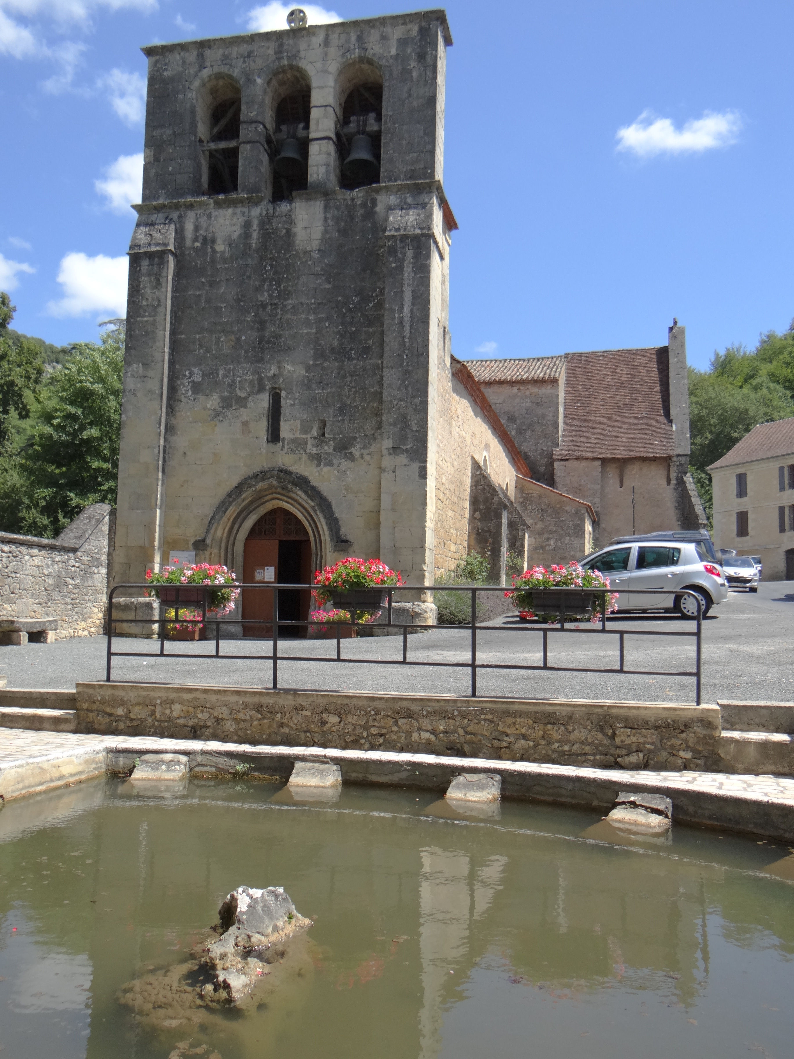 Campagne (Dordogne) - Église Saint-Jean-Baptiste de Campagne